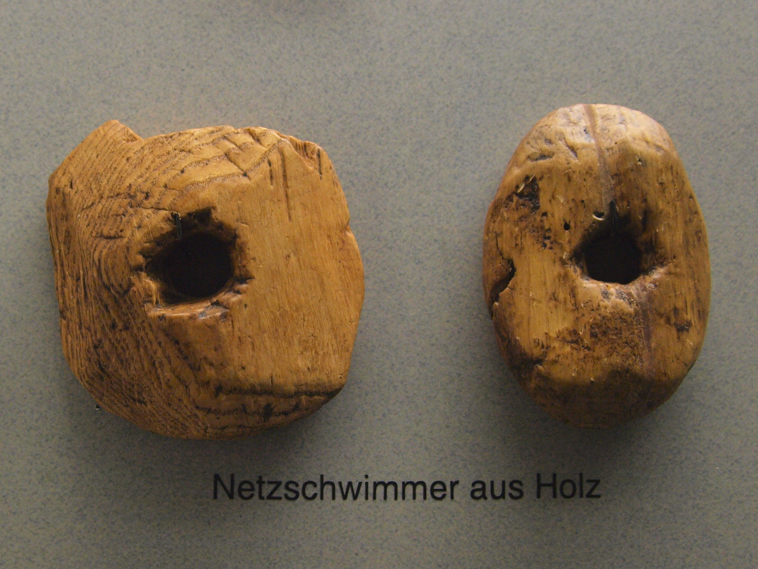 Zwei Netzschwimmer aus Holz aus der Jungsteinzeit. Gefunden im Kreis Schleswig-Flensburg. Fotografiert im Archäologischen Landesmuseum Schleswig-Holstein Schloss Gottor, Schleswig.